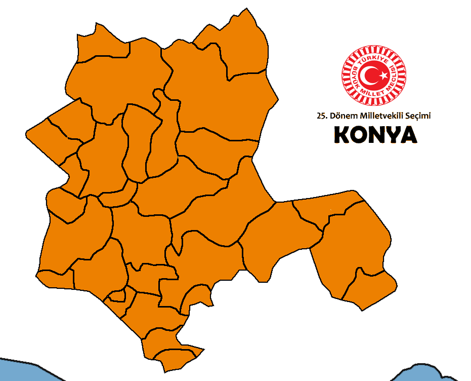 2015 genel seçim sonuçları